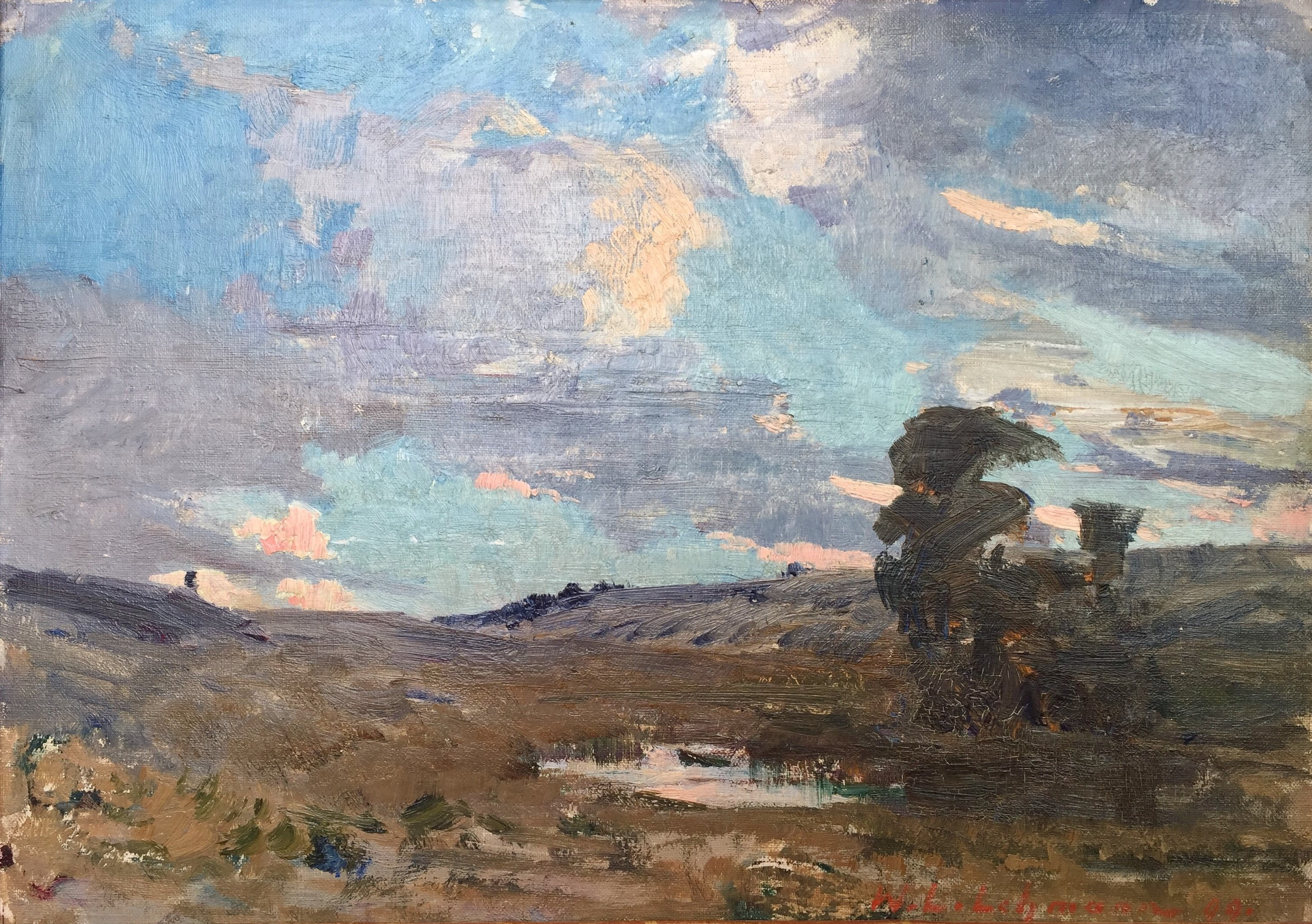 Wilhelm Ludwig Lehmann - Vannes in der Bretagne (Öl auf Leinwand) (Privatsammlung)